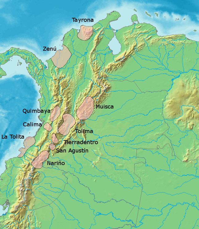 Culture précolombiennes en Colombie